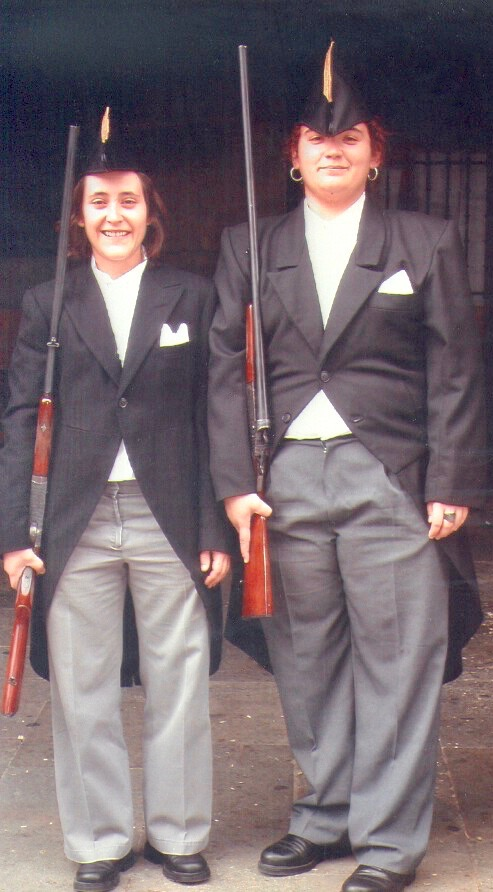 Nekane Urizar eta Saioa Gomez, lehen emakumeak Errebonbilloetan parte hartzen soldadu moduan (2003)